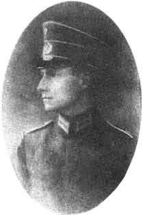 Hans-Jürgen Adam Ludwig Oscar Leopold Bernard Arthur Graf von Blumenthal (1907–1944)